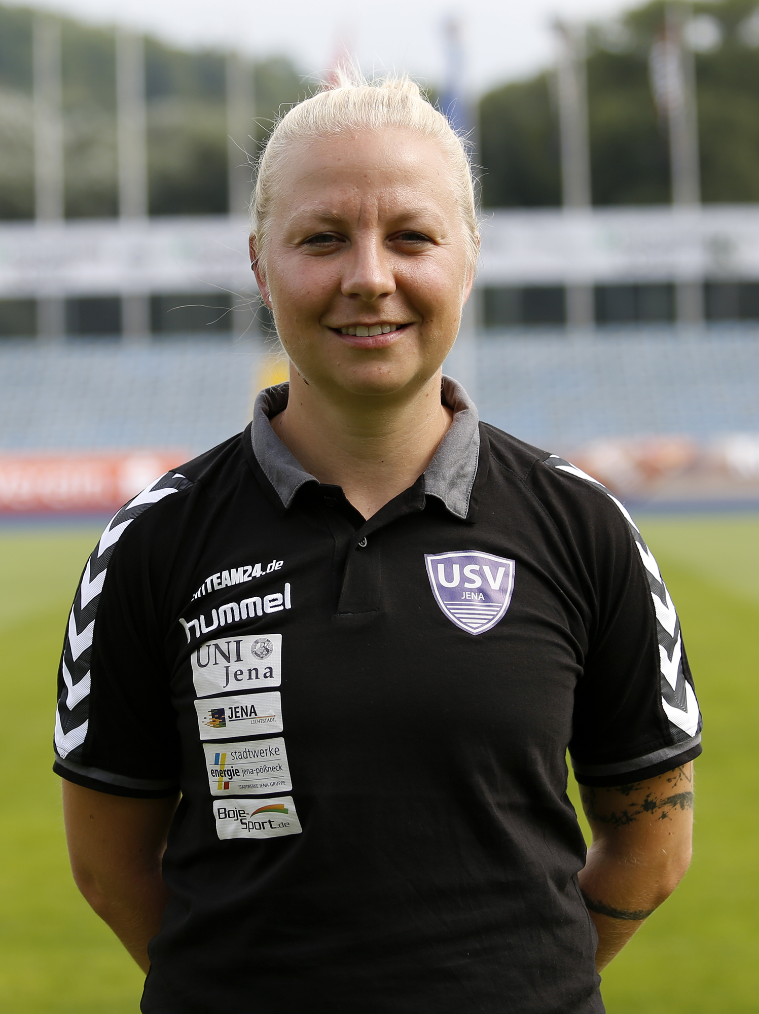 Katja Greulich